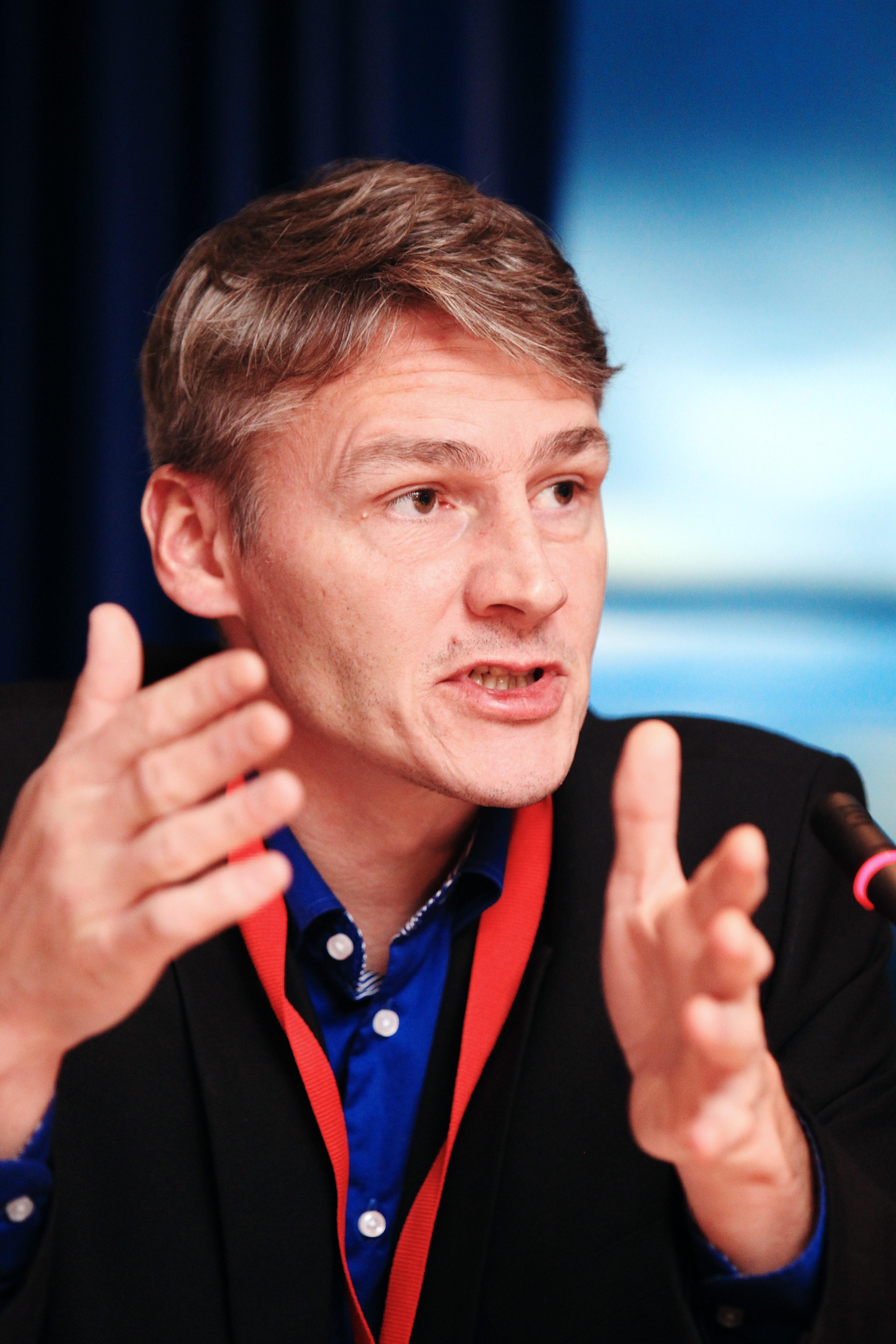 Høgni Hoydal, Färöarna, Nordiska rådets session 2010